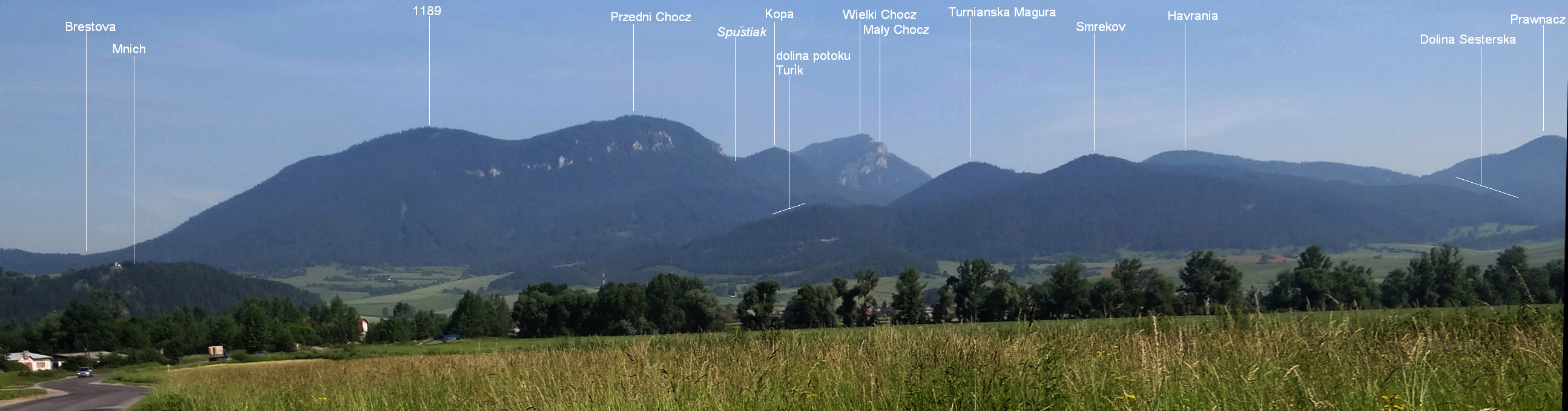 Panorama Grupy Wielkiego Chocza od połuidniowej strony